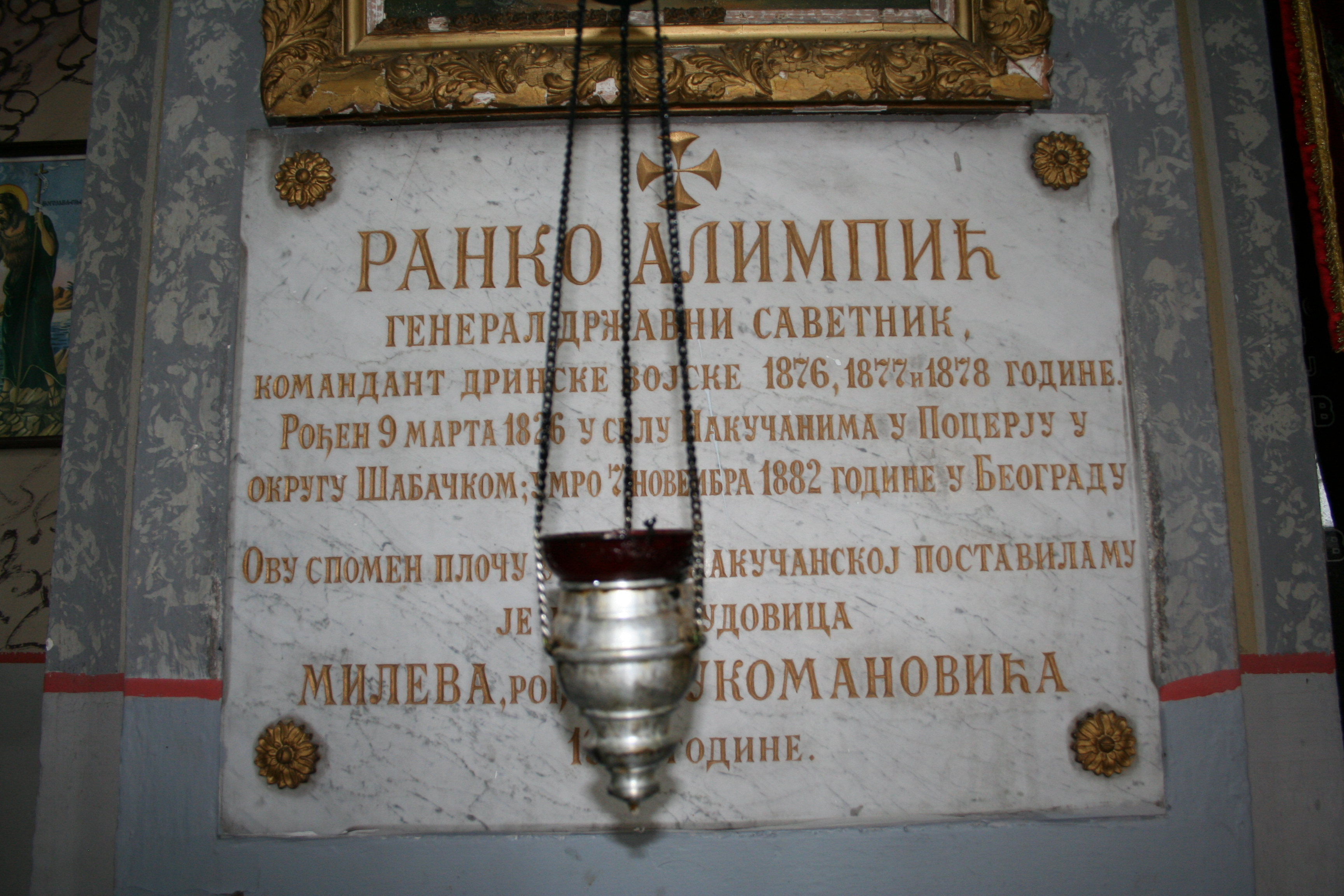 Crva rođenja Svetog Jovana Krstitelja, Nakučani